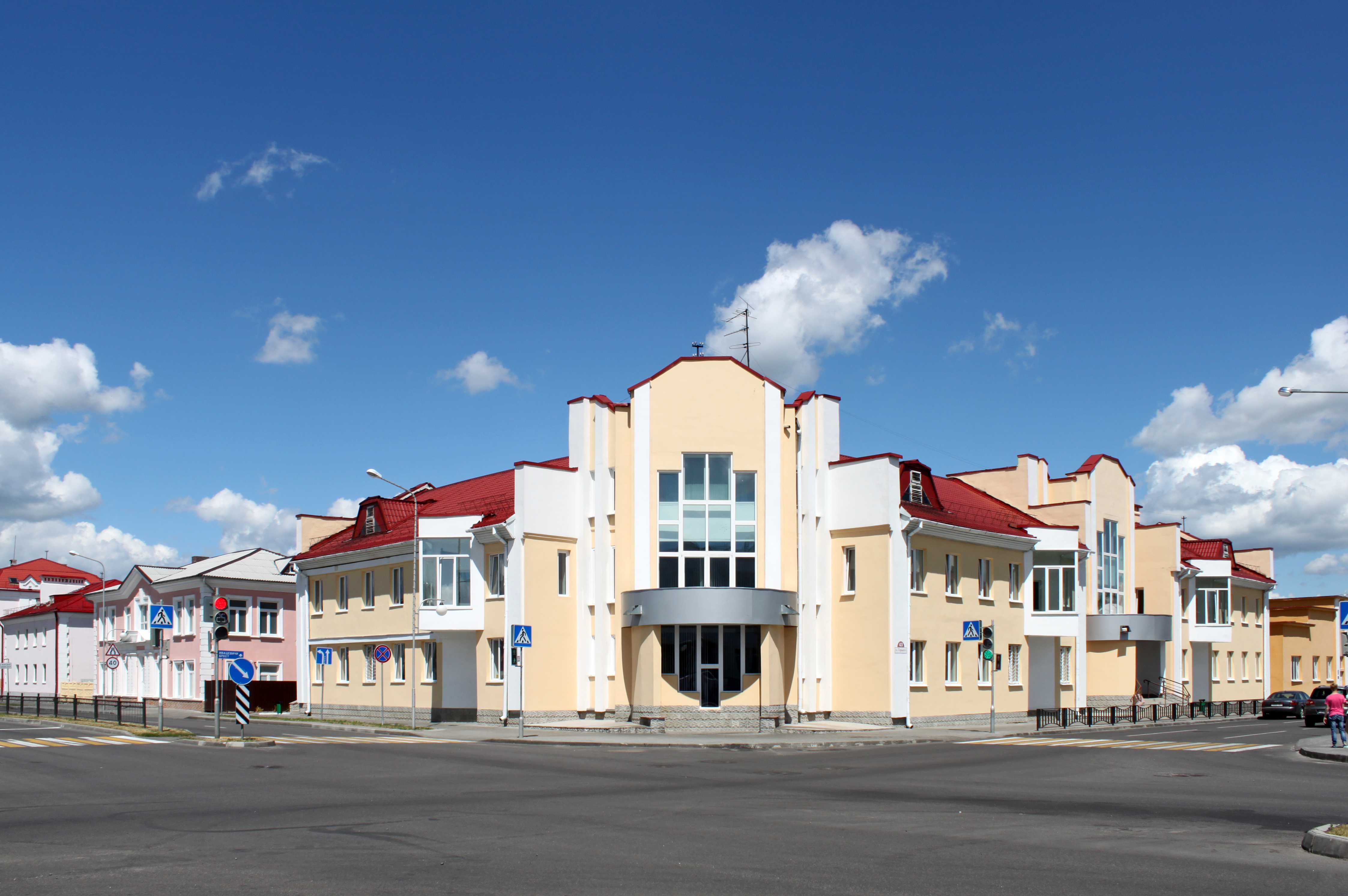 Пинск,улица Горького. Станция переливания крови.